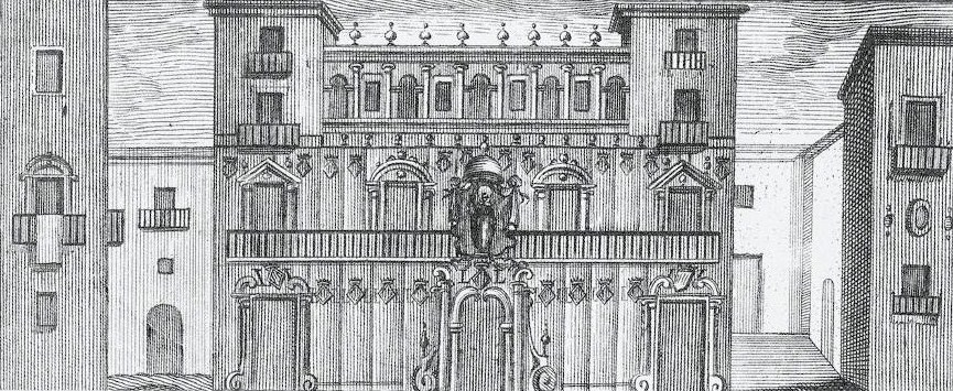 Façana de la Casa de la Ciutat de València en un gravat de Josep Vergara de 1762.